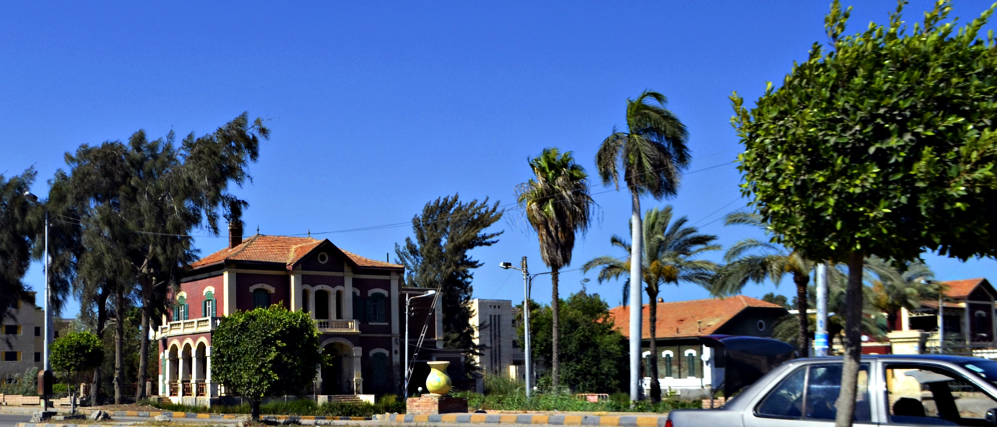 سخا، كفر الشيخ، مصر